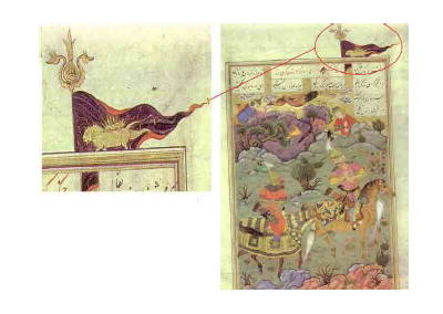 پرچم شیروخورشید نشان در شاهنامهٔ رشیدا (نبرد گیو و گُروی زره)